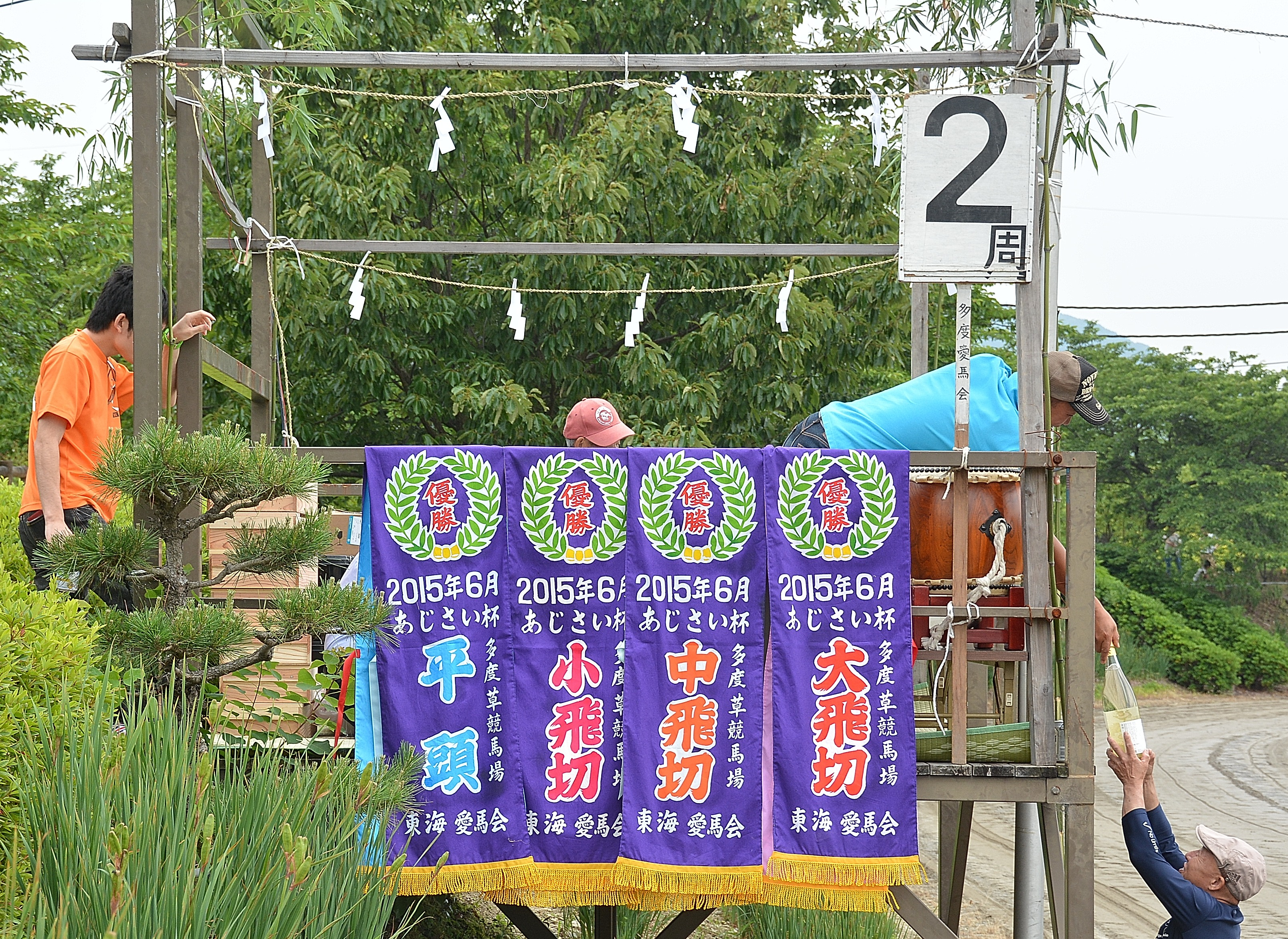 2015年6月14日に三重県桑名市にある「アイリスパークみぞの」で開催された草競馬の大会である「東海愛馬会草競馬大会」にて、本部席へ掲示されている優勝レイを撮影したもの。